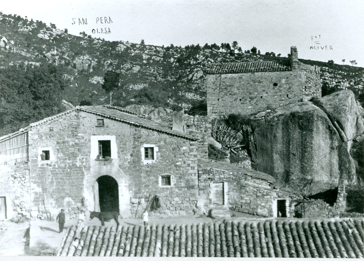 Vista general de la masia i ermita de Sant Pere Sacama l'any 1915. La masia data del segle XVII i fou enderrocada l’any 1977, l’ermita és d’origen romànic i fou restaurada l’any 1986 pel Centre Muntanyenc i de Recerques Olesà.